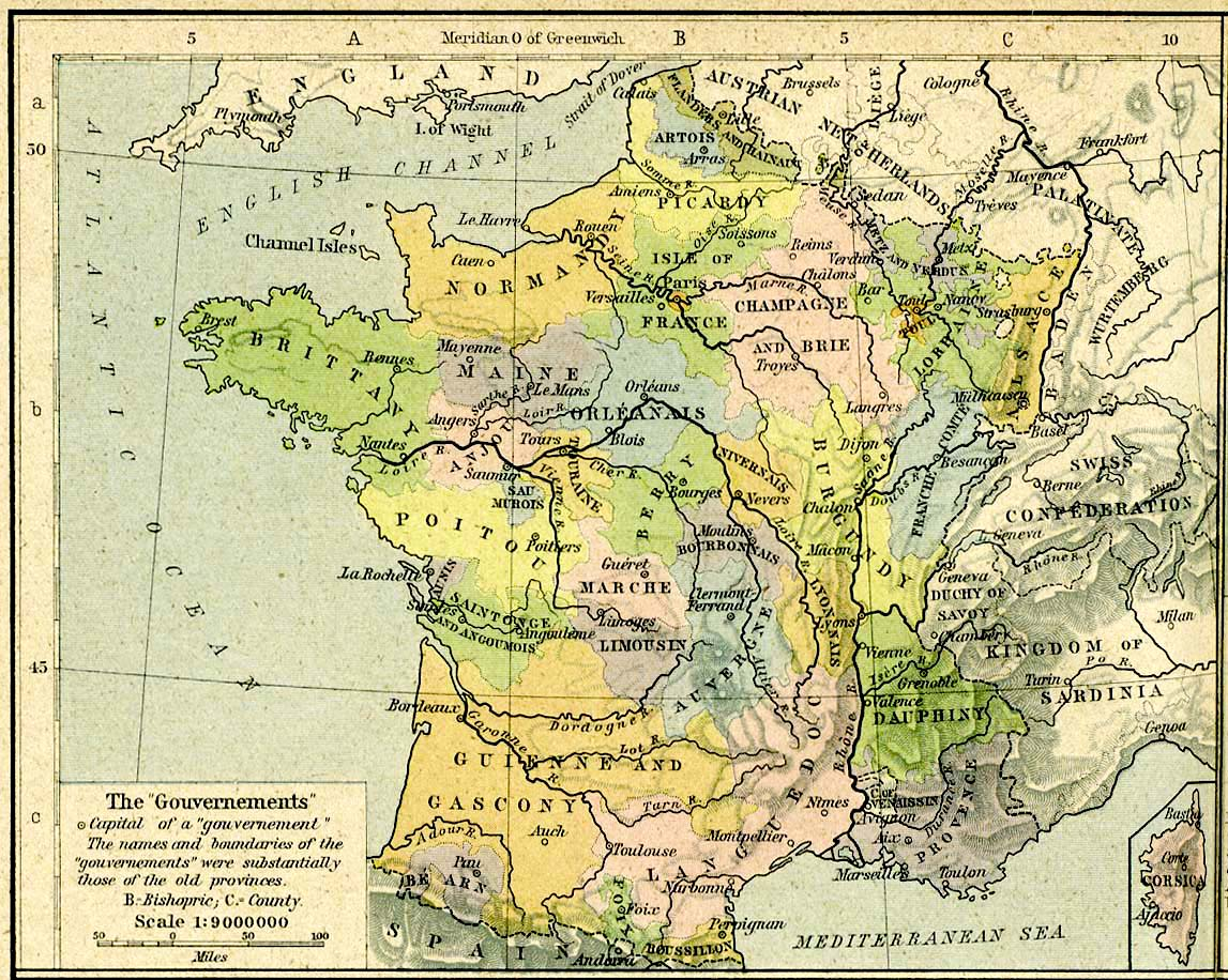 Carte des anciens gouvernements français en 1789 in The Historical Atlas by William R. Shepherd, 1926 (Les provinces ont des frontières différentes)